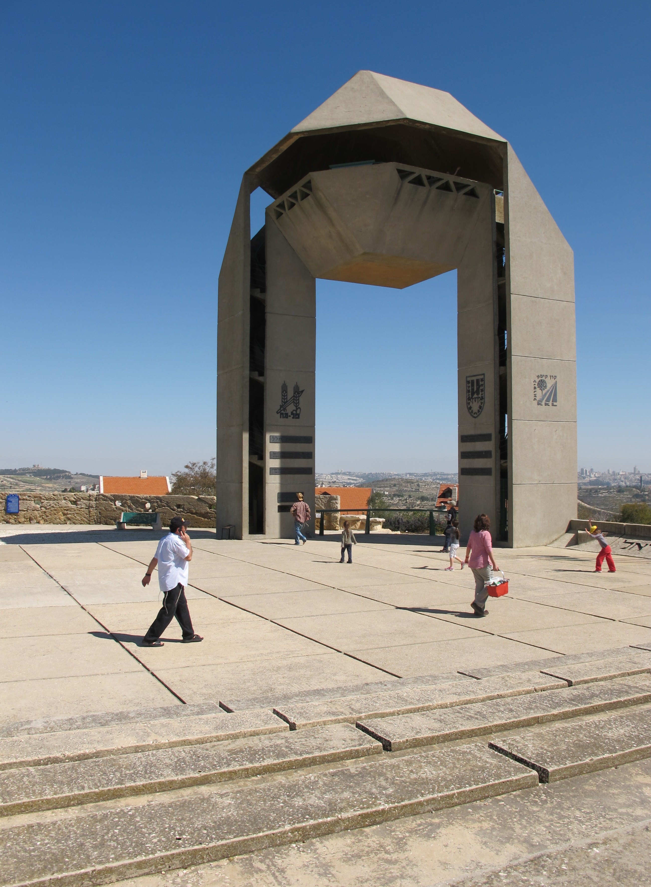 מגדל מים ותצפית בפסגת הר אדר כאתר הנצחה לחללי חטיבת הראל בתכנון אריה שרון ואלדר שרון התמונה מוקדשת לצבי אלחייני